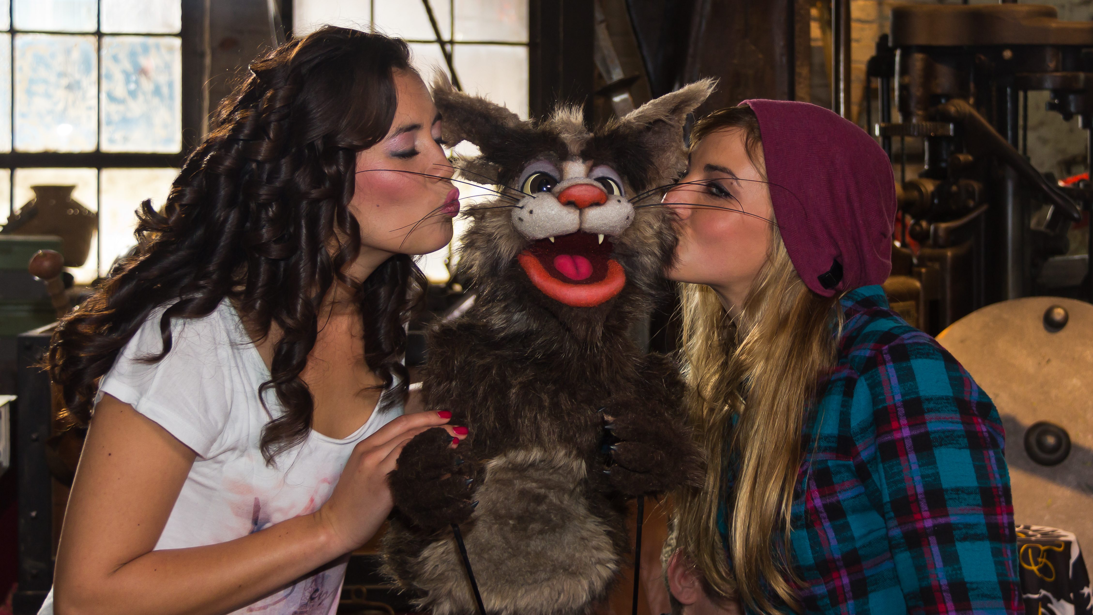 Dreharbeiten zur KiKA Geschichts-Comedy „Kaiser! König! Karl!“ im Rheinischen Industriebahnmuseum Köln Foto: Christine Henning, Klappmaulpuppe Kater Karl (gespielt und gesprochen von René Marik) und Luana Bellinghausen